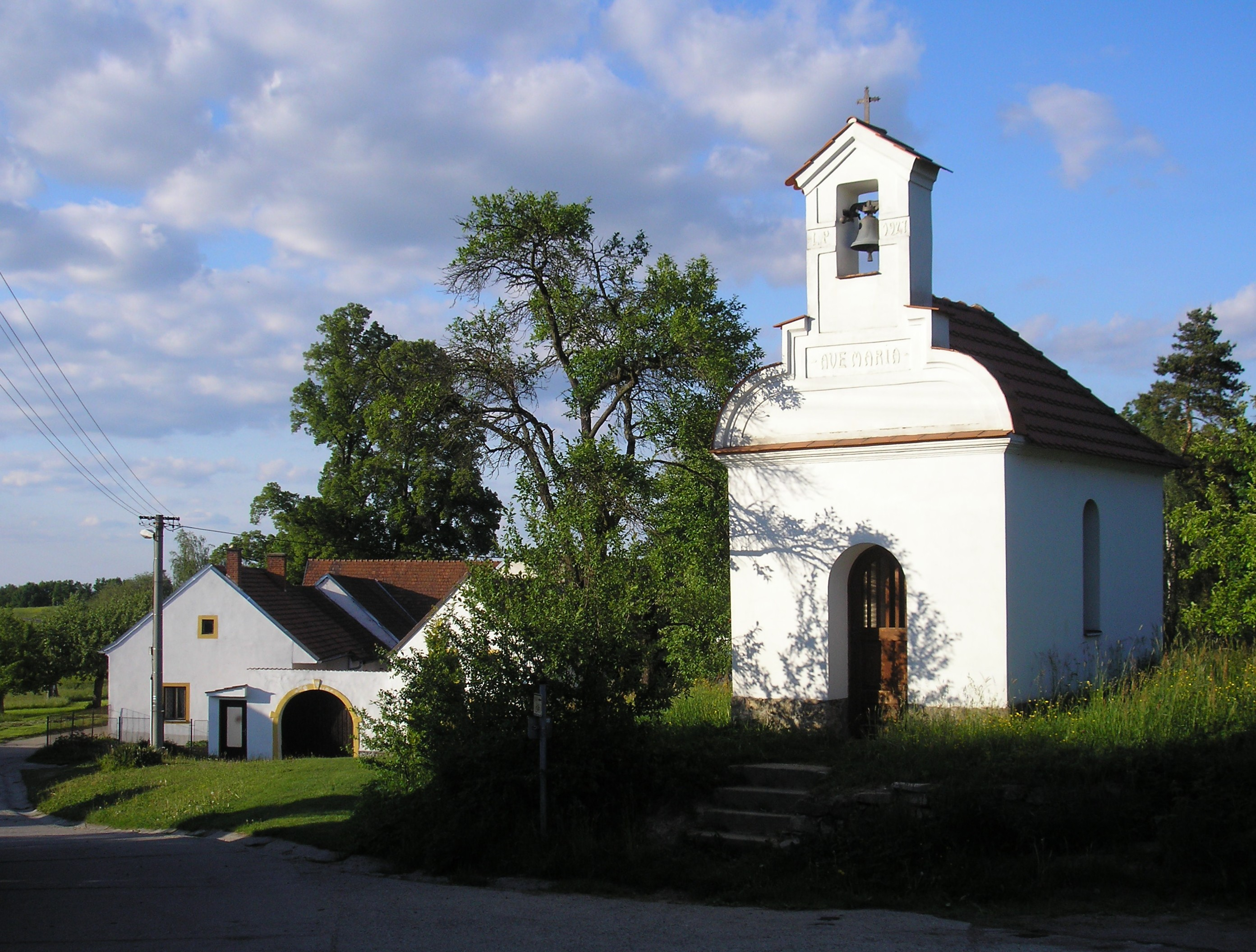 Návesní kaple Panny Marie se zvoničkou v Kladinách